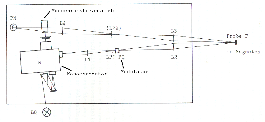 Spektrometer zur Untersuchung des Reflexionsspektrums einer Probe, die in einem Magneten angeordnet ist. Bis zum Monochromatoraustrittsspalt wird Spiegeloptik verwendet, ab dort Linsenoptik, um genügend Entfernung zum Magneten zu erreichen.